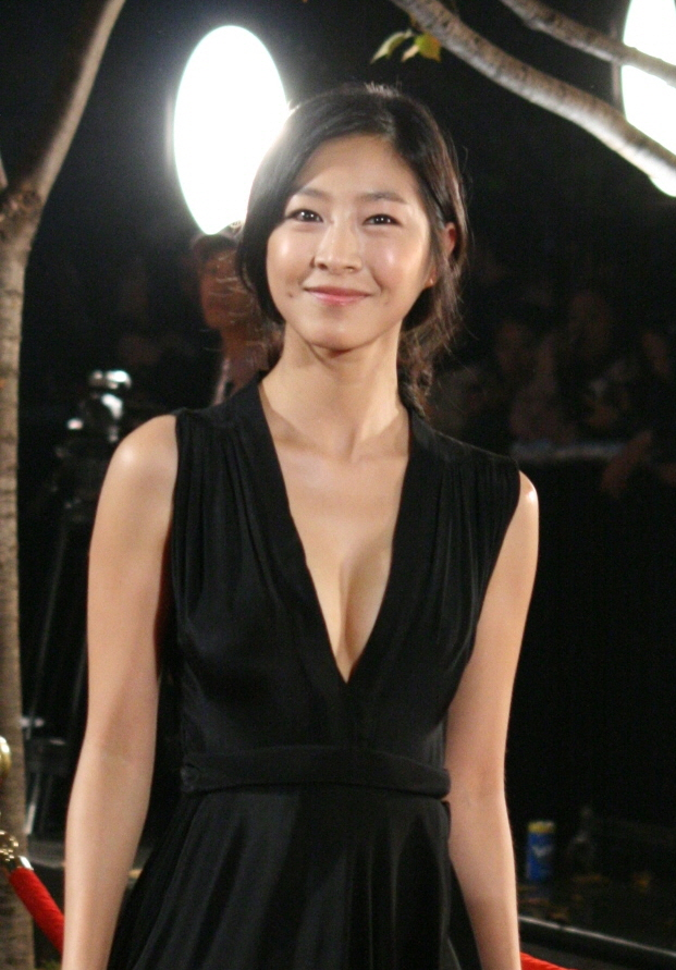 2011인드브랜드페어&2011스타일아이콘어워즈 550